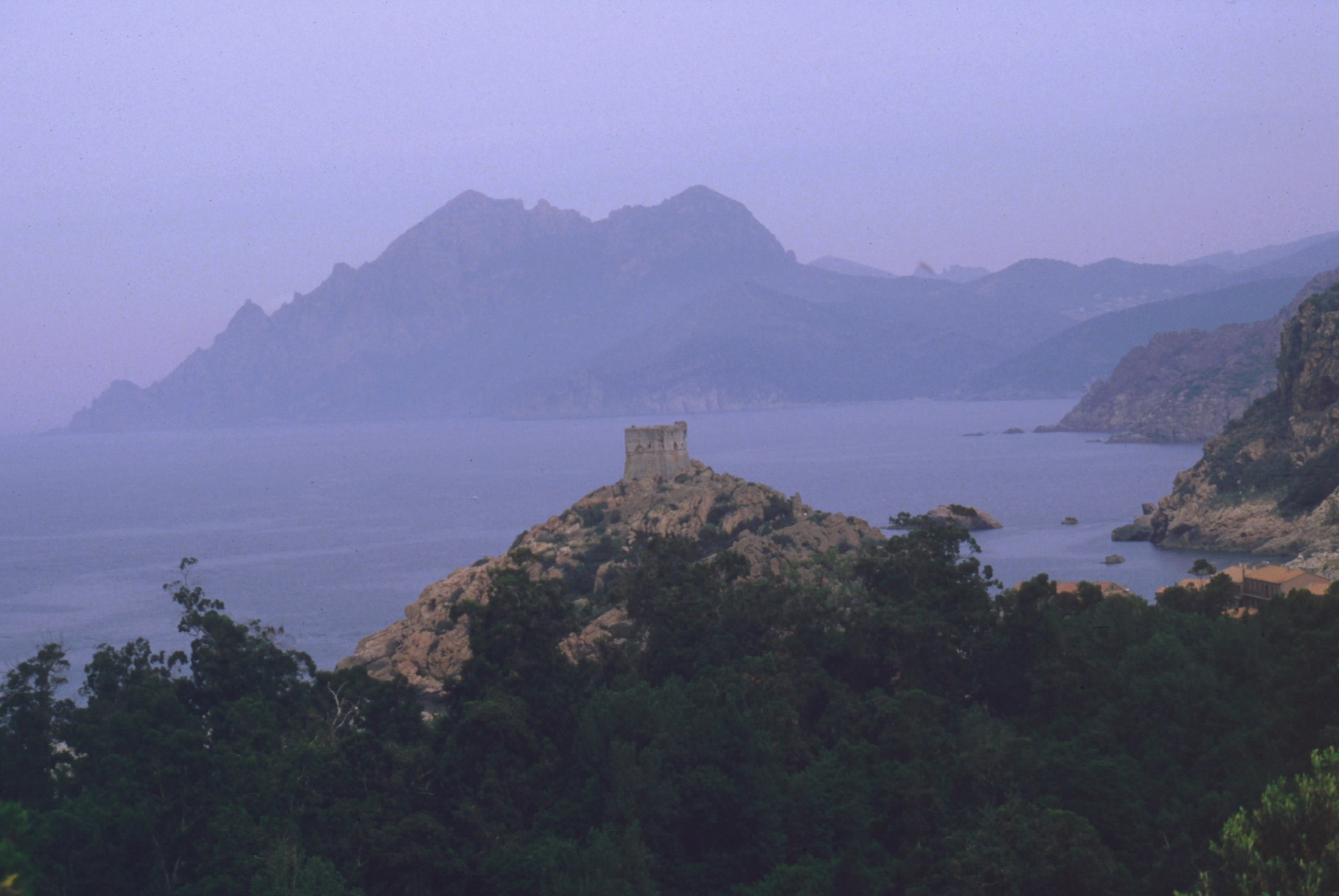 Korsika, Porto, Genuesischer Wachturm.